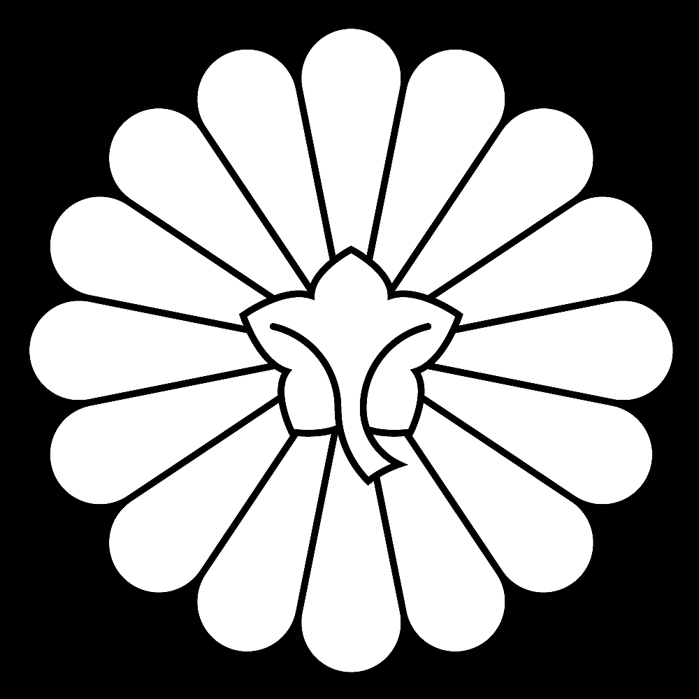 菊紋の一種「裏菊」。16弁の菊花紋章を裏から見た意匠の家紋。